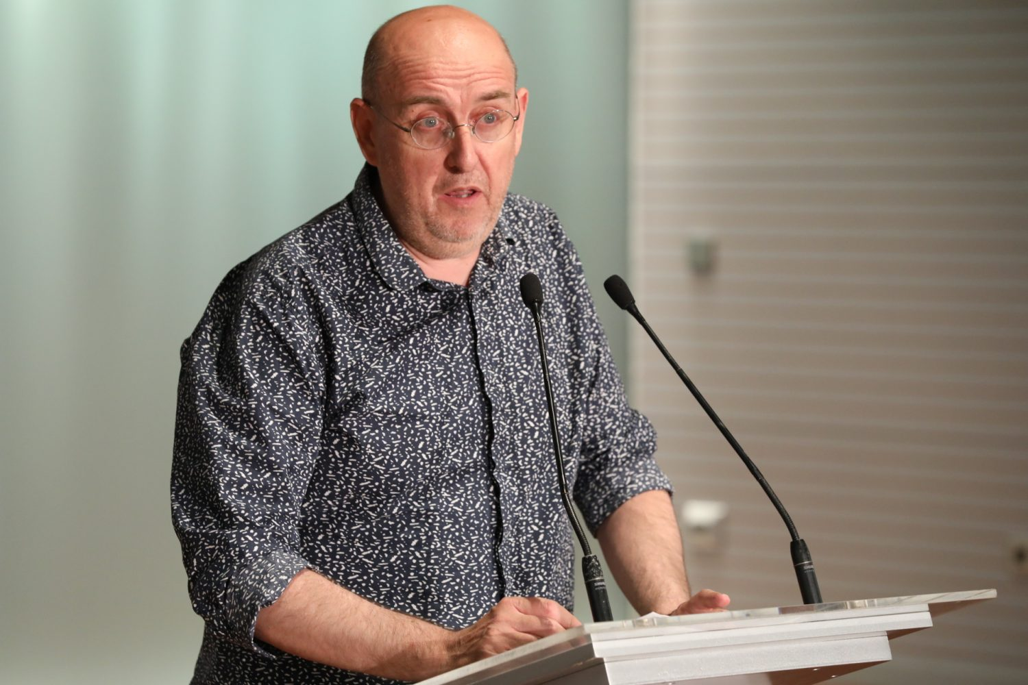 Con motivo de la celebración de la 31 Feria Internacional del Libro de México (FIL) que se celebra en Guadalajara del 25 noviembre al 3 diciembre de 2017, Madrid, que será la ciudad invitada, desarrollará un amplio programa cultural (artes plásticas, música, cine y teatro), literario, académico y profesional. Las actividades estelares del “invitado de honor” se realizan en el recinto ferial, en un pabellón de 1.800 metros cuadrados que Madrid levantará para desarrollar foros literarios, encuentros comerciales de la industria editorial y la promoción cultural y turística de la ciudad.